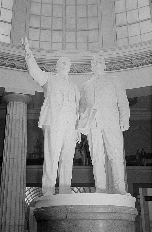 Original image description from the Deutsche FotothekPlastik Lenins und Stalins auf der Leipziger Herbstmesse 1954